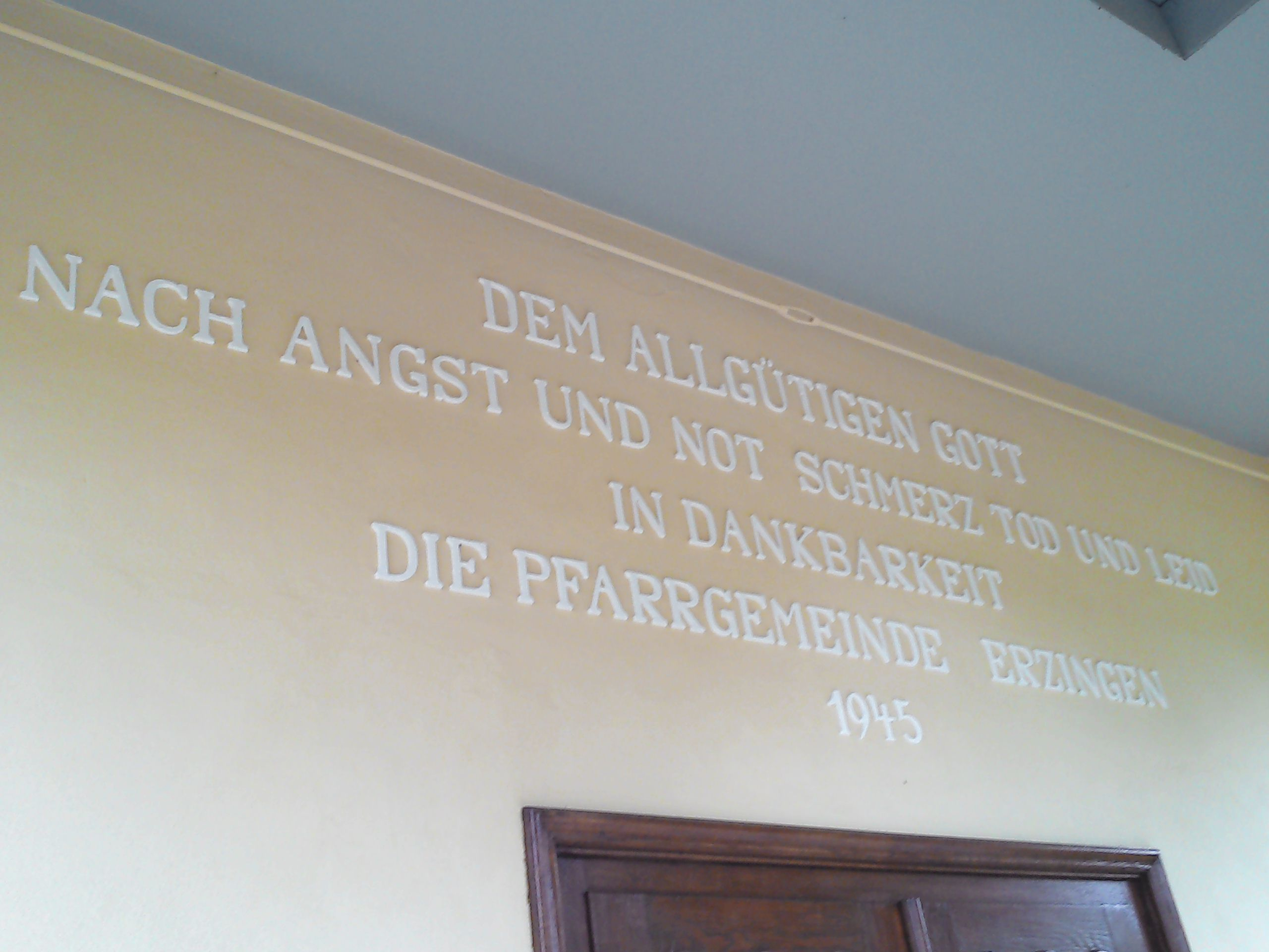 Die Bergkapelle von Erzingen, Gemeinde Klettgau, Landkreis Waldshut in Baden-Württemberg. Errichtet aufgrund eines Gelübdes 1945. Die Losung beim 1. Spatenstich als Inschrift.